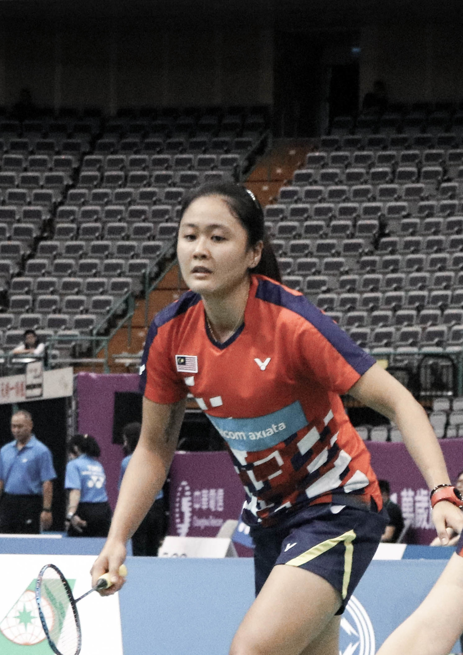 2018 台北OPEN 10/03